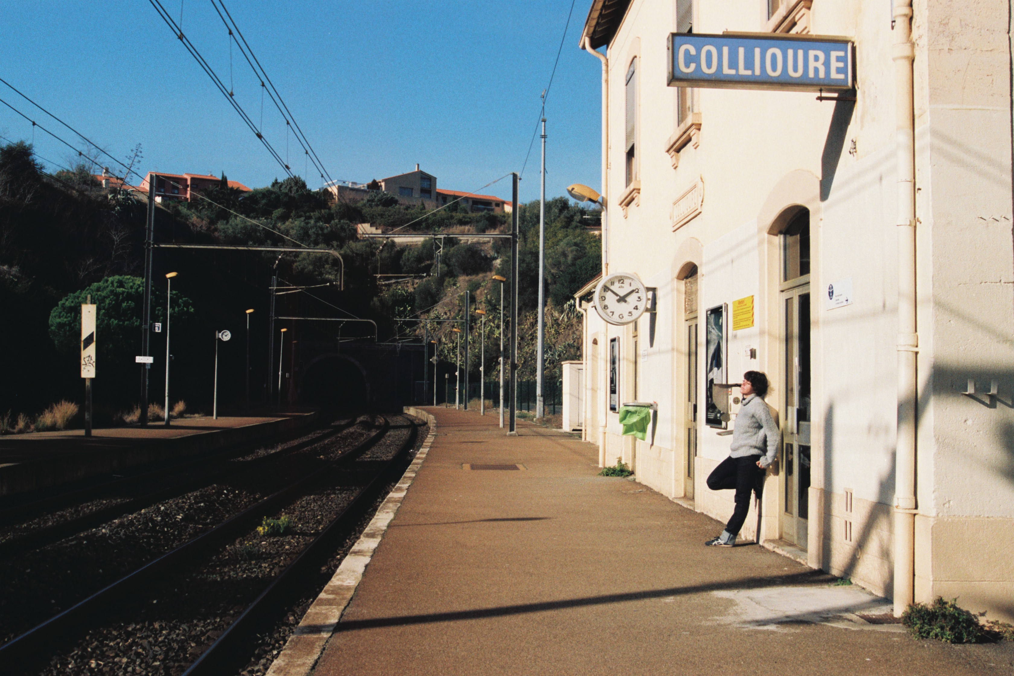 La gare de Collioure, Pyrénées-Orientales, France